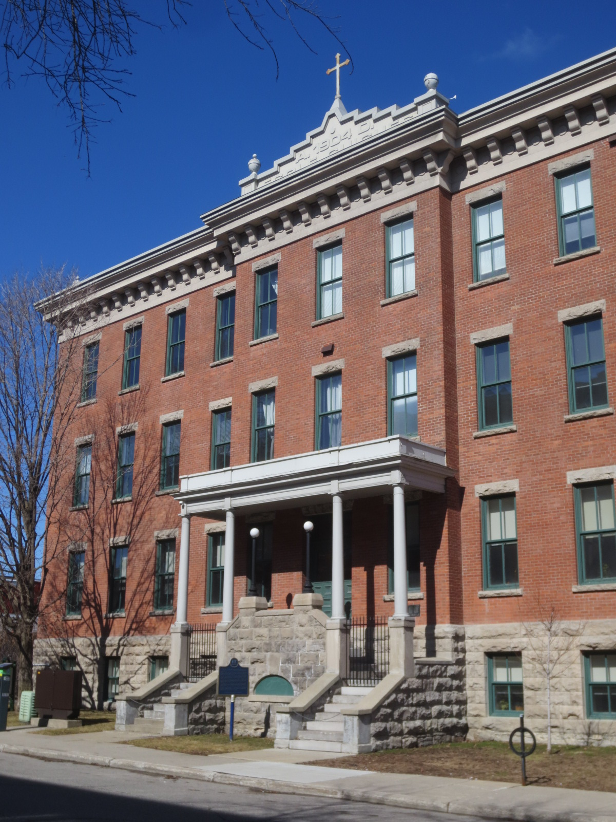 Site historique de la « bataille des épingles à chapeaux », épisode des protestations du règlement 17.